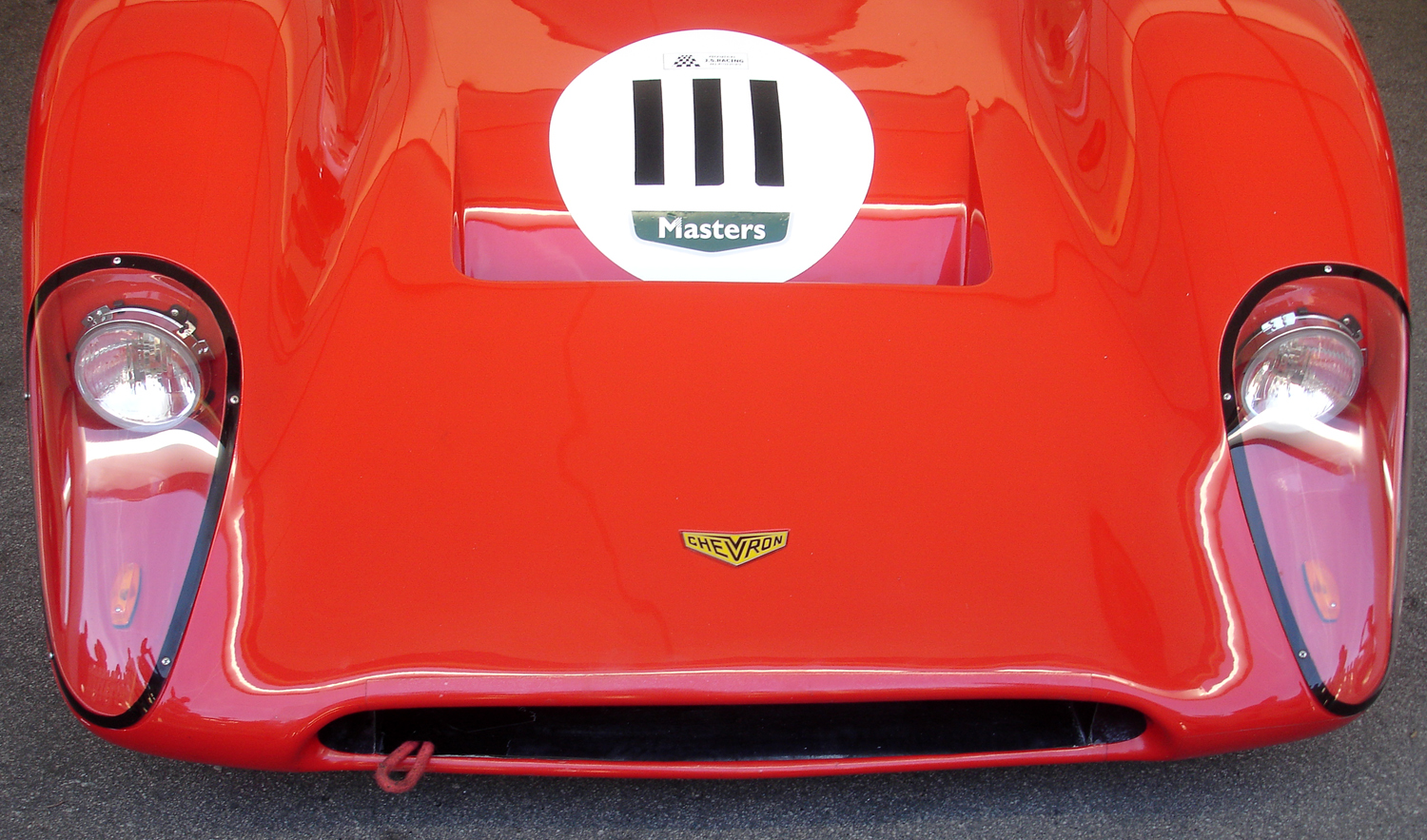 Chevron B16 exposat al festival Martini Legends (commemoració del 75 aniversari del Circuit de Montjuïc)